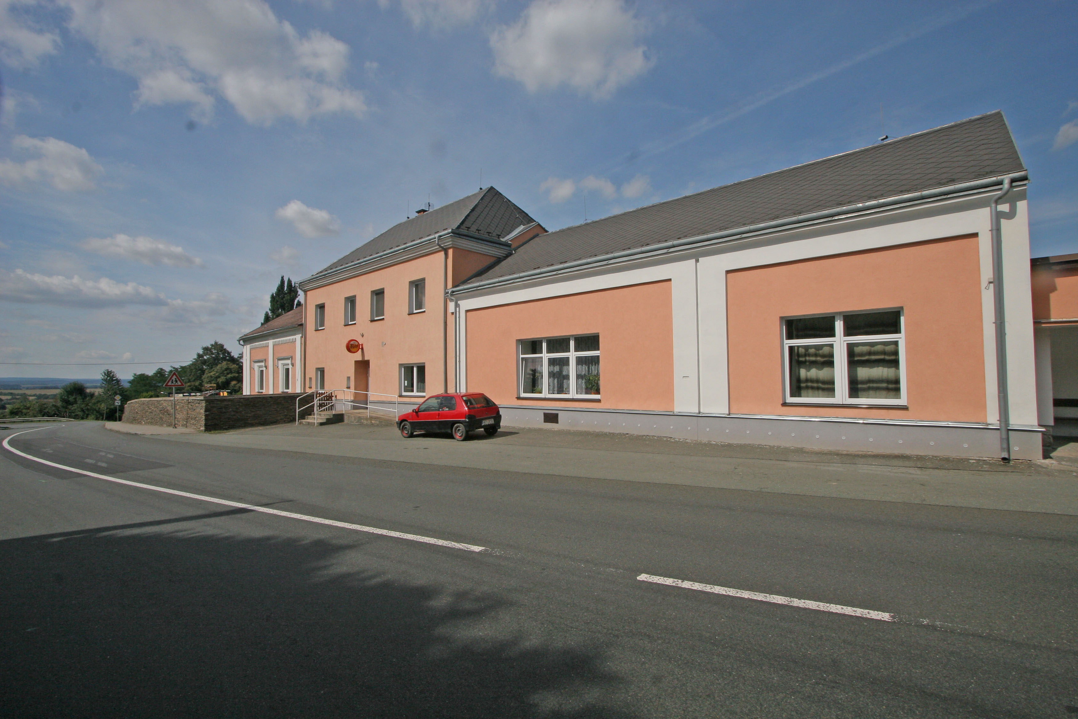 Podhořany hostinec